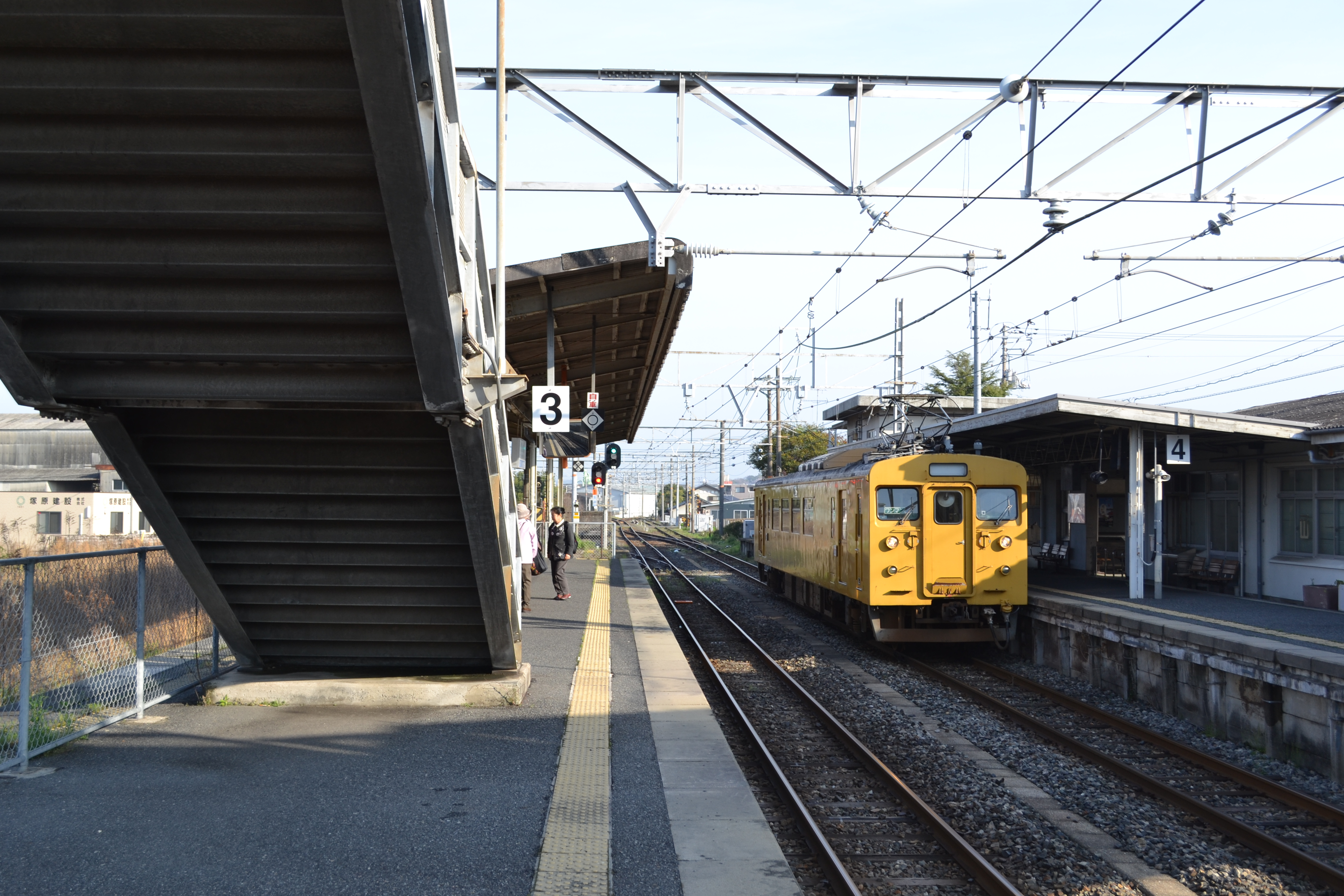 居能駅プラットフォーム